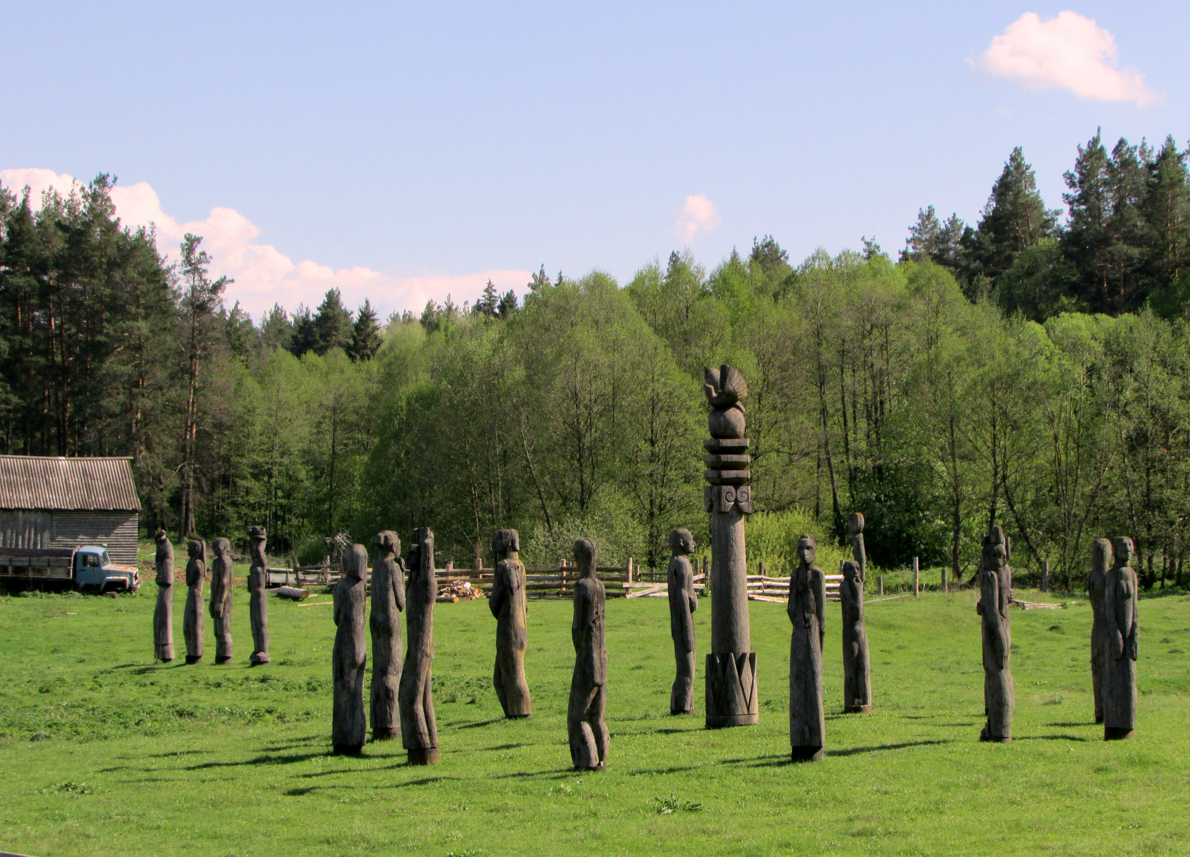 "Пархатар" - комплекс традиционной чувашской культуры (автор Ф. Мадуров)